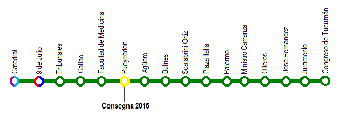 Linea D Buenos Aires